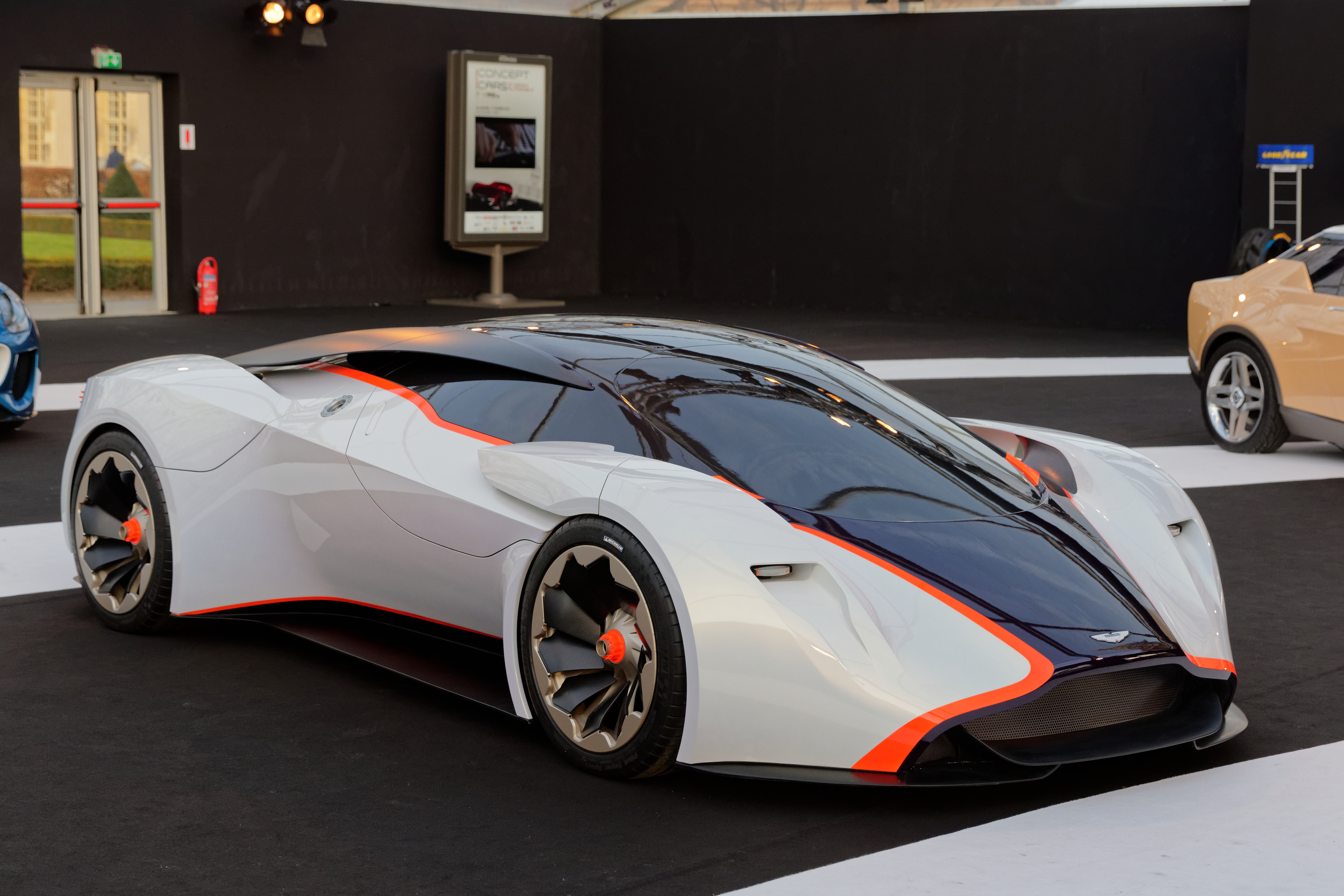 L'Aston Martin DP 100 Vision Gran Turismo exposée lors du festival automobile international 2015.